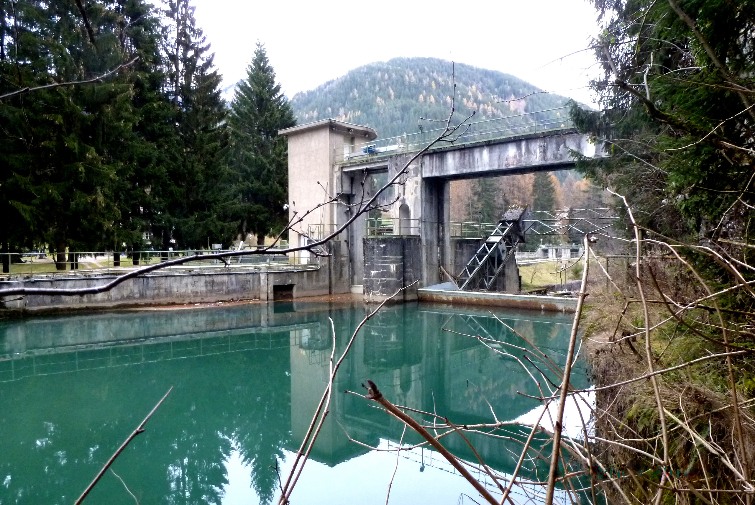 Wasserkraftwerk St.Anton, Bozen, Wasserfassung der Talfer im Sarntal bei Bad Schörgau (Bagni di Serga)